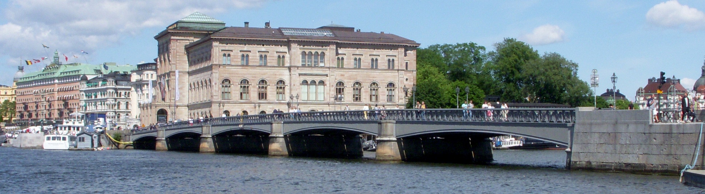 Skeppsholmsbron i Stockholm